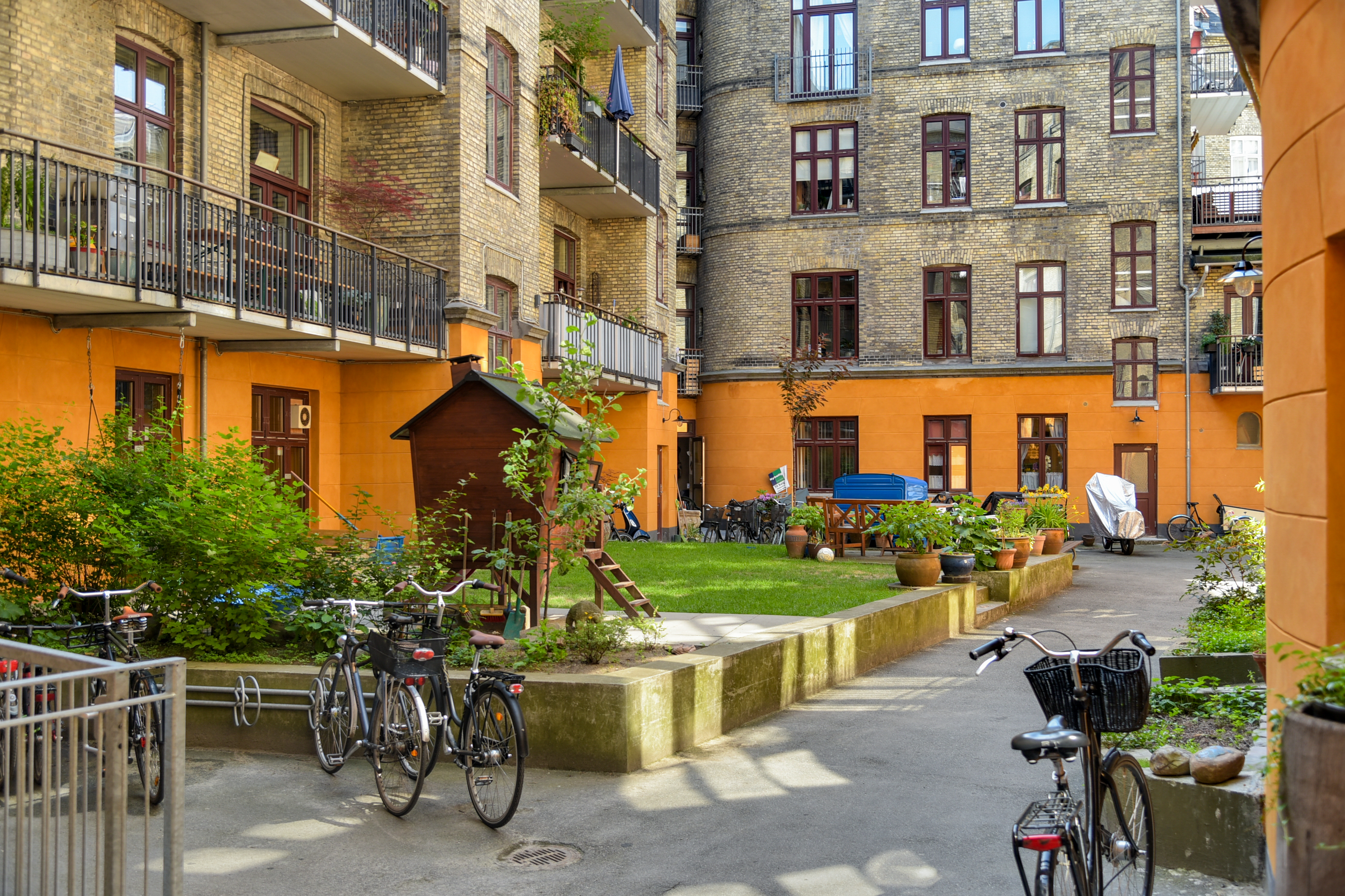 Copenhagen (Denmark)